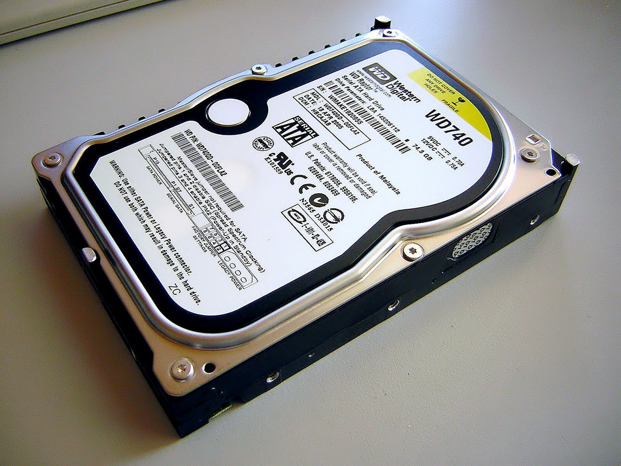 Festplatte Western Digital WD740 Raptor 74GB SATA